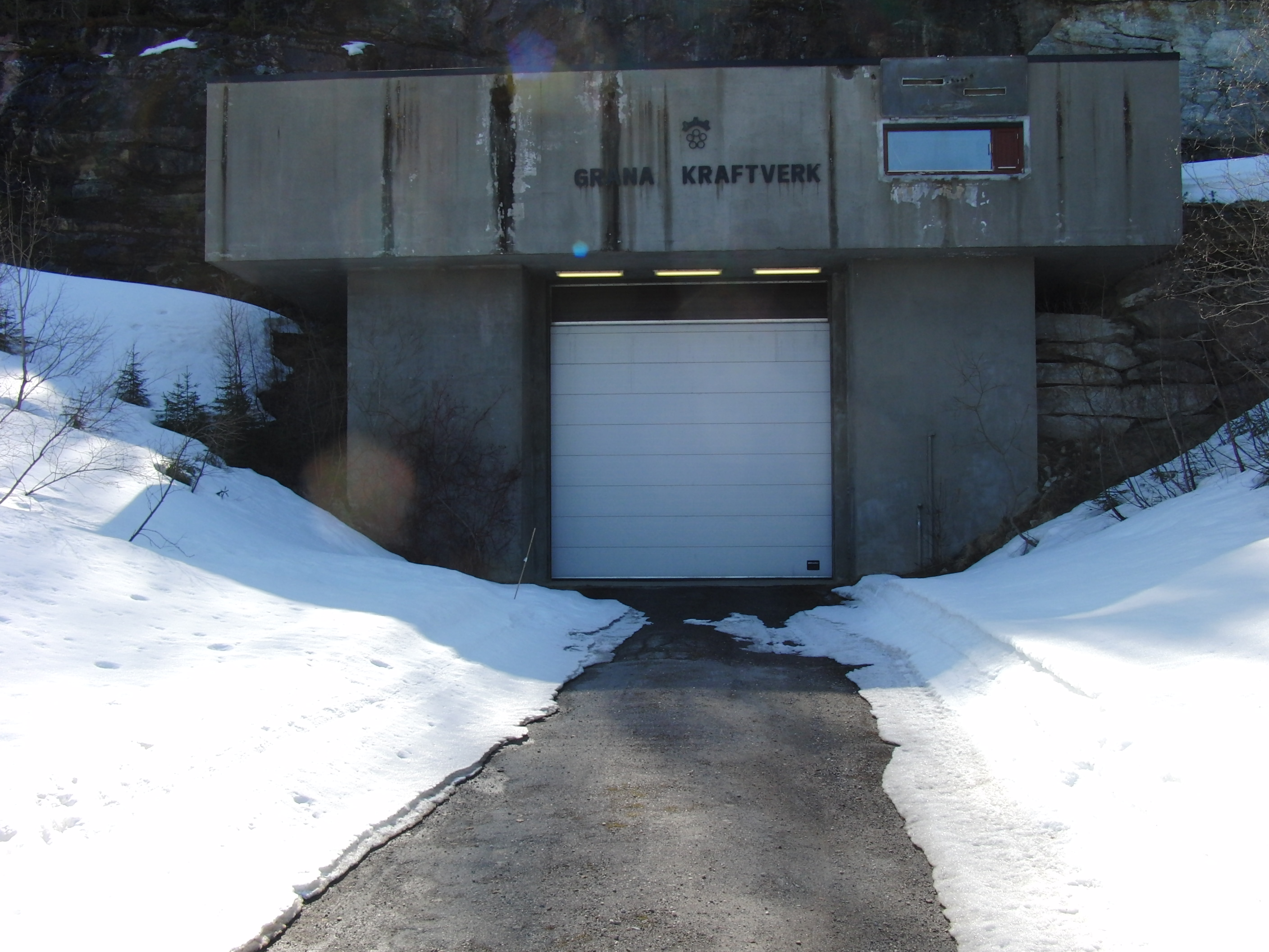 Grana kraftverk